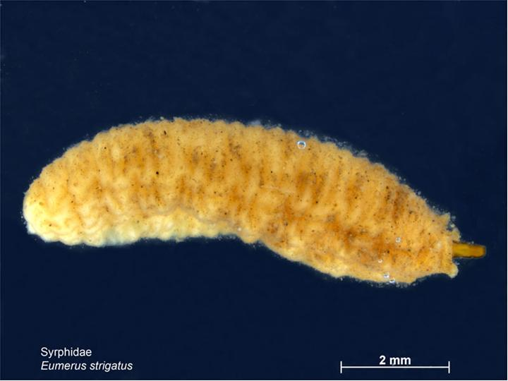 Eumerus strigatus, larva.